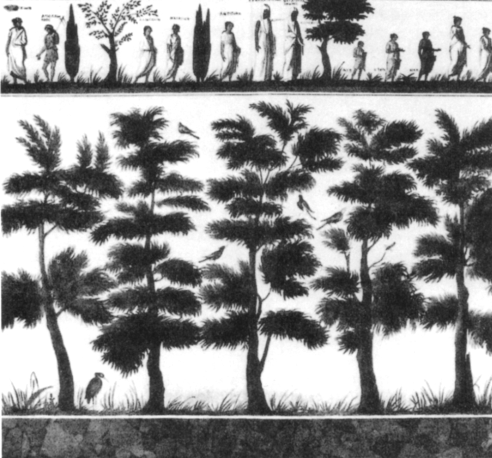 Disegno della tomba di patron sulla via latina, roma, 1843